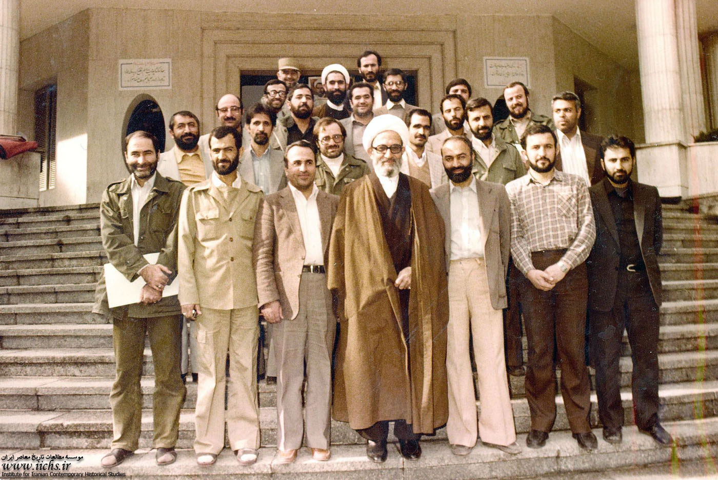 کابینه موقت محمدرضا مهدوی کنی